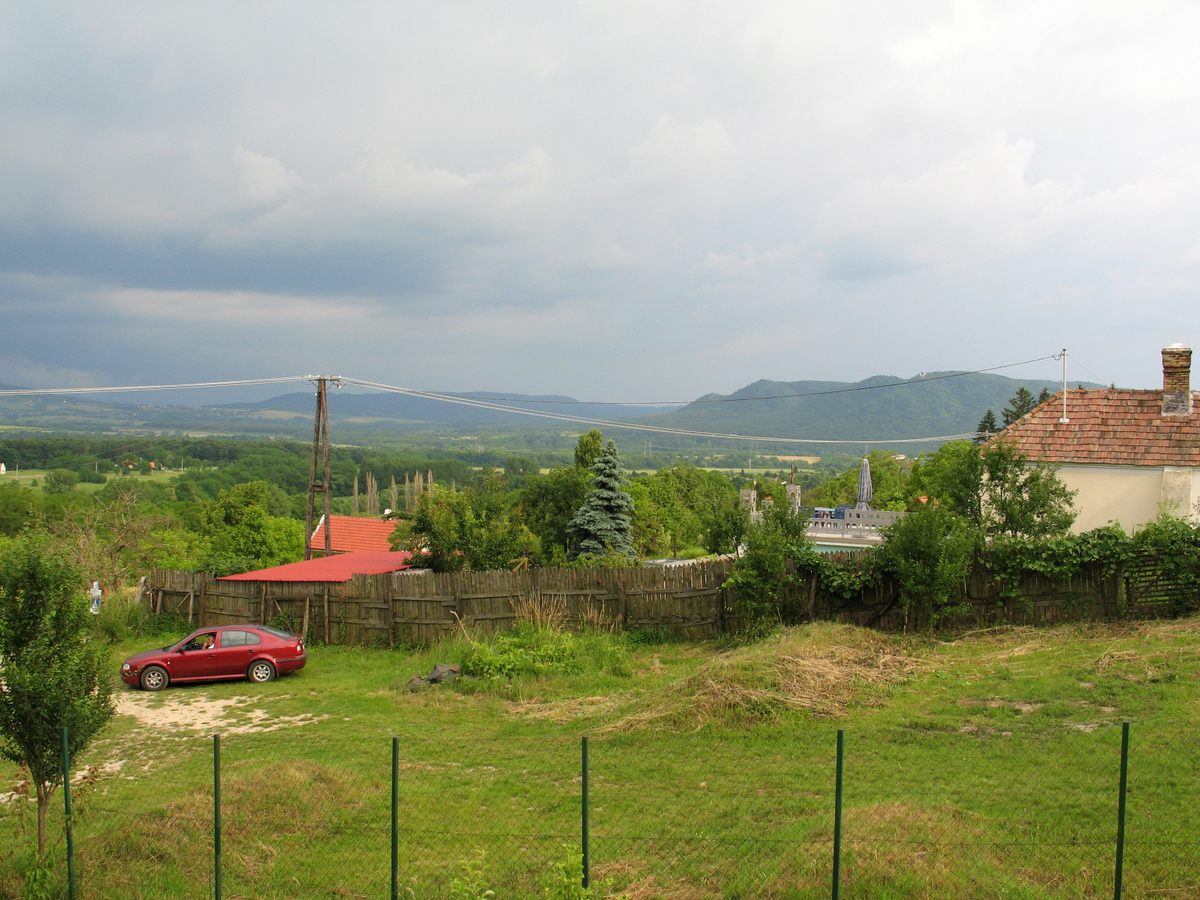 Zalaszäntö. Foto by Victor Belousov.